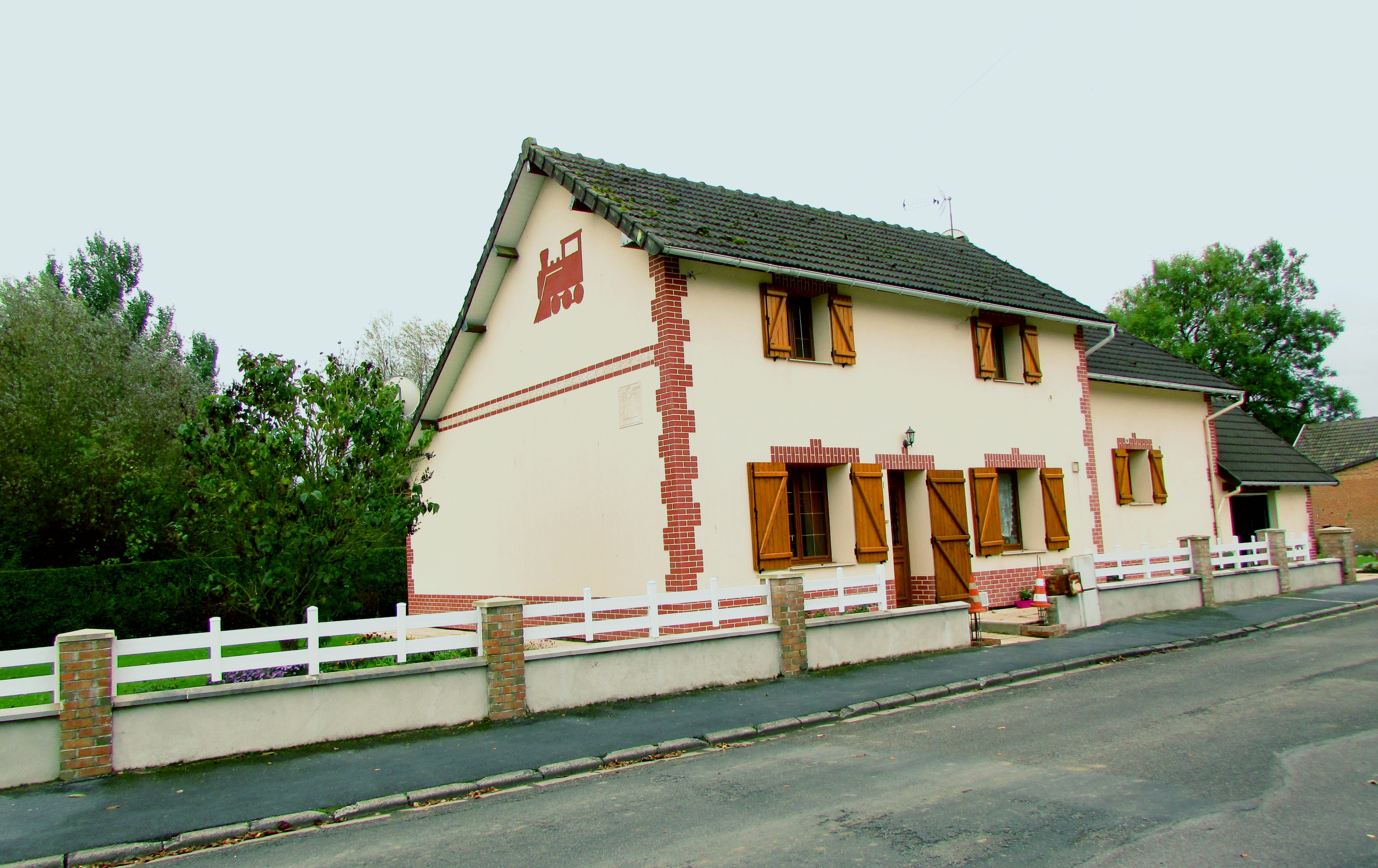 La gare de Montbrehain en 2017.